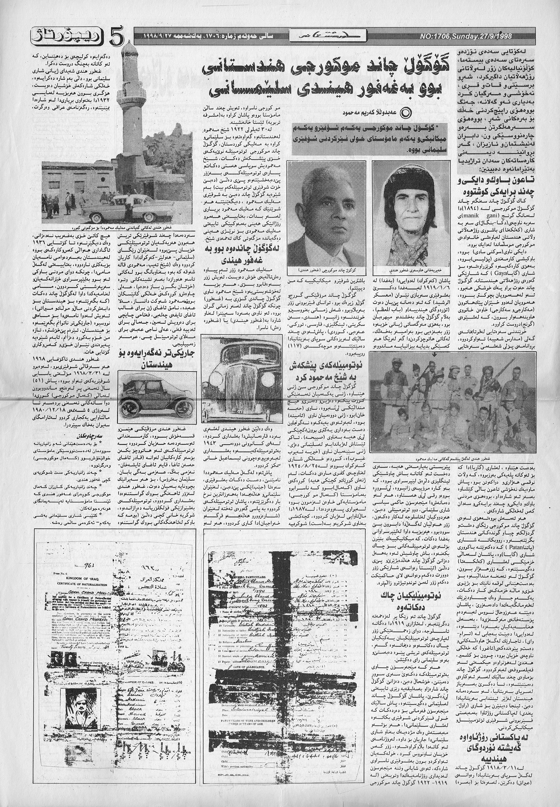 کوردی: ژمارە ١٧٠٦ی ڕۆژنامەی کوردستانی نوێ. چیرۆکی گۆگۆل جاند مکورجی